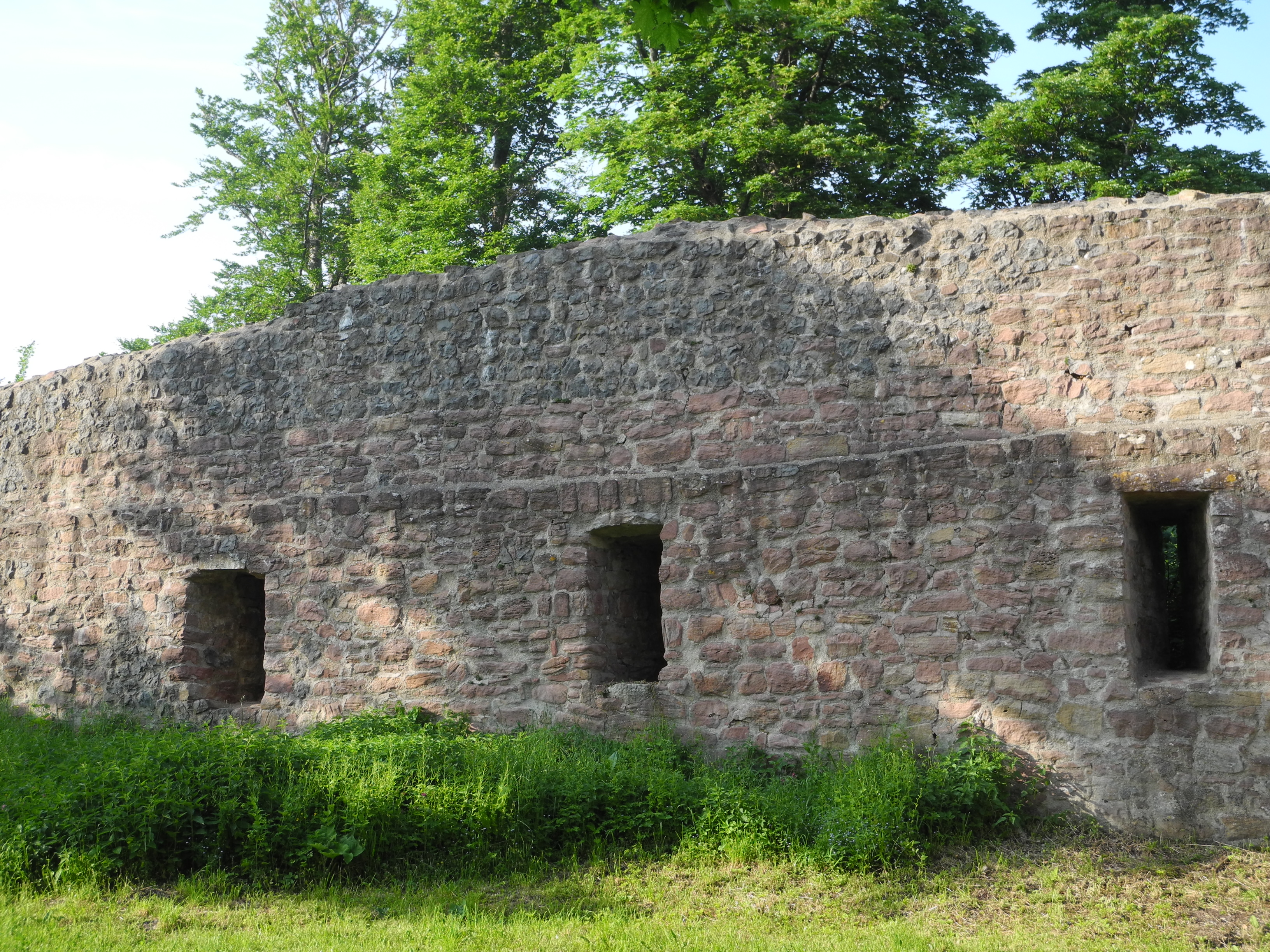 Die Ruine Auersburg ist die Ruine einer Höhenburg in der Rhön, in der Gemeinde Hilders im Landkreis Fulda in Hessen, Deutschland.